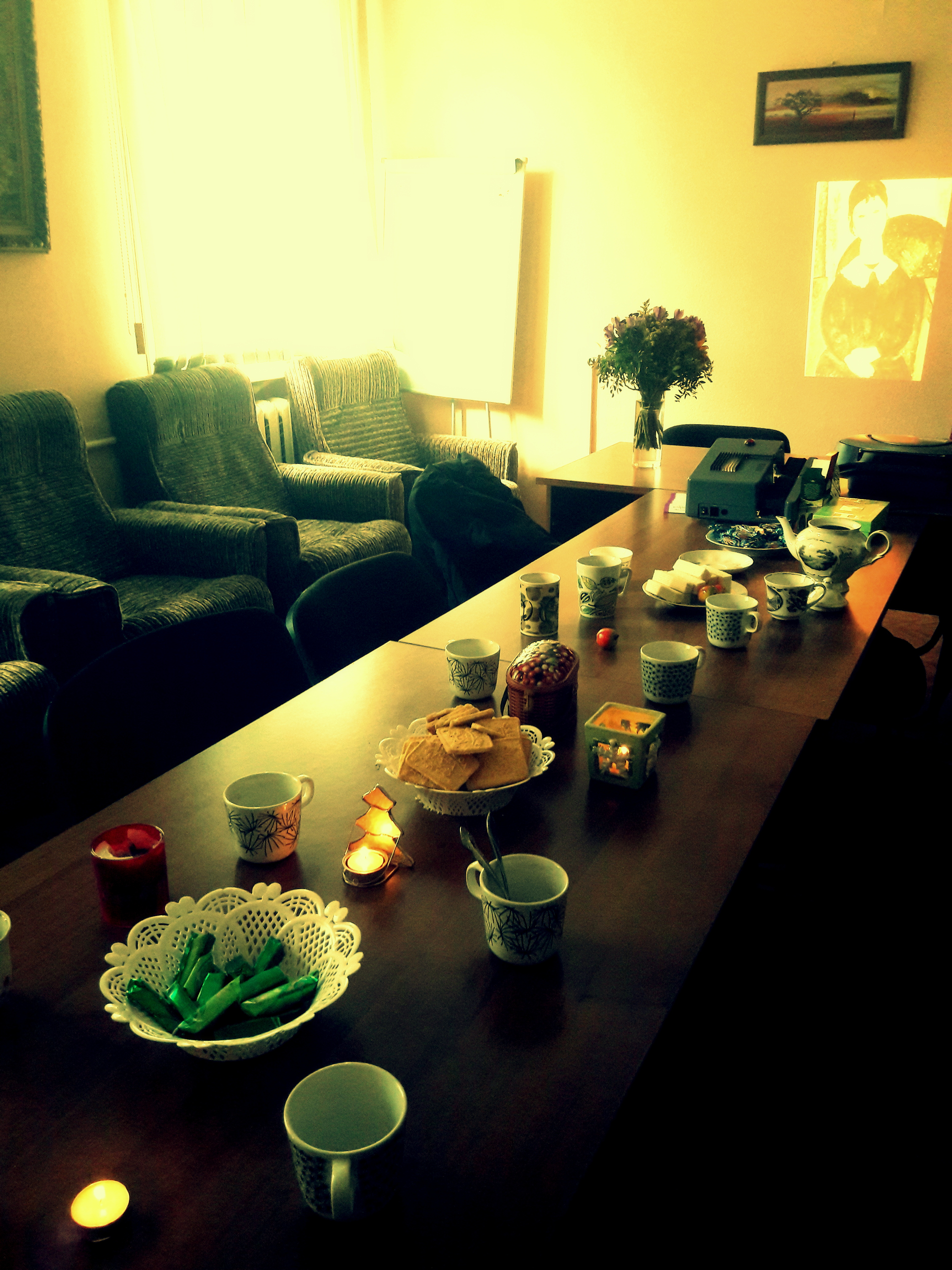 Творческая гостиная для занятий по методу "Терапия творческим самовыражением" М.Е. Бурно, кафедра психотерапии РМАПО. На слайде картина Модильяни к занятию о замкнуто-углубленном характере.